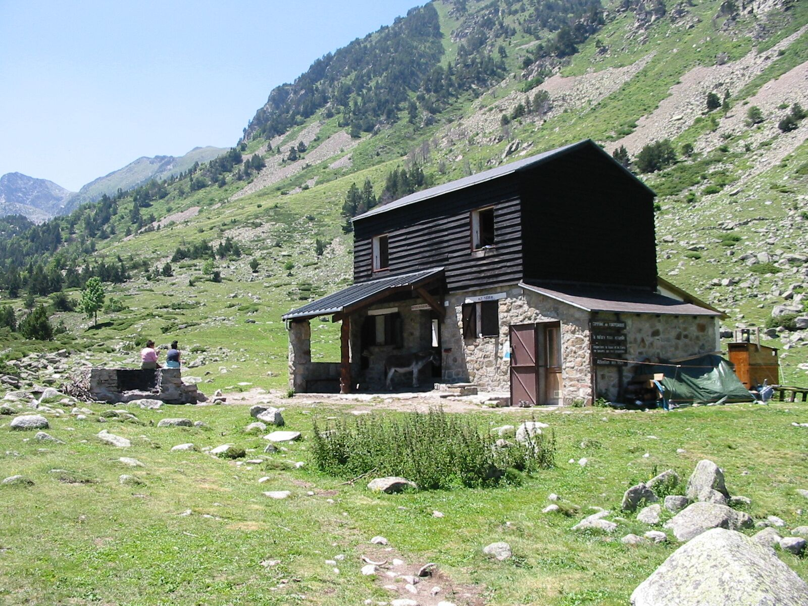 Refuge du Ras de la Carança, Fontpédrouse, Pyrénées-Orientales, France